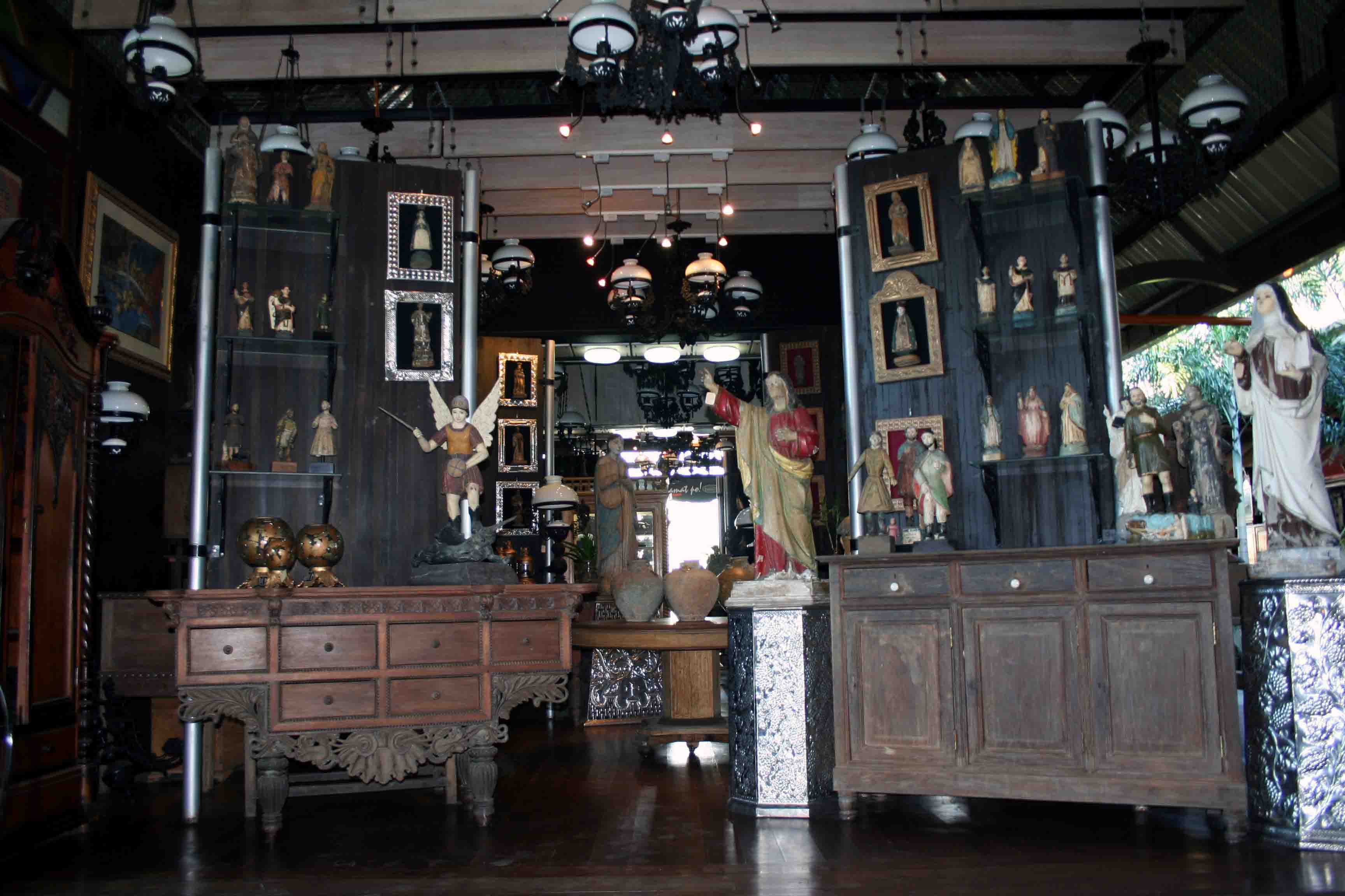 Picture of Antiques Village in Tiendesitas